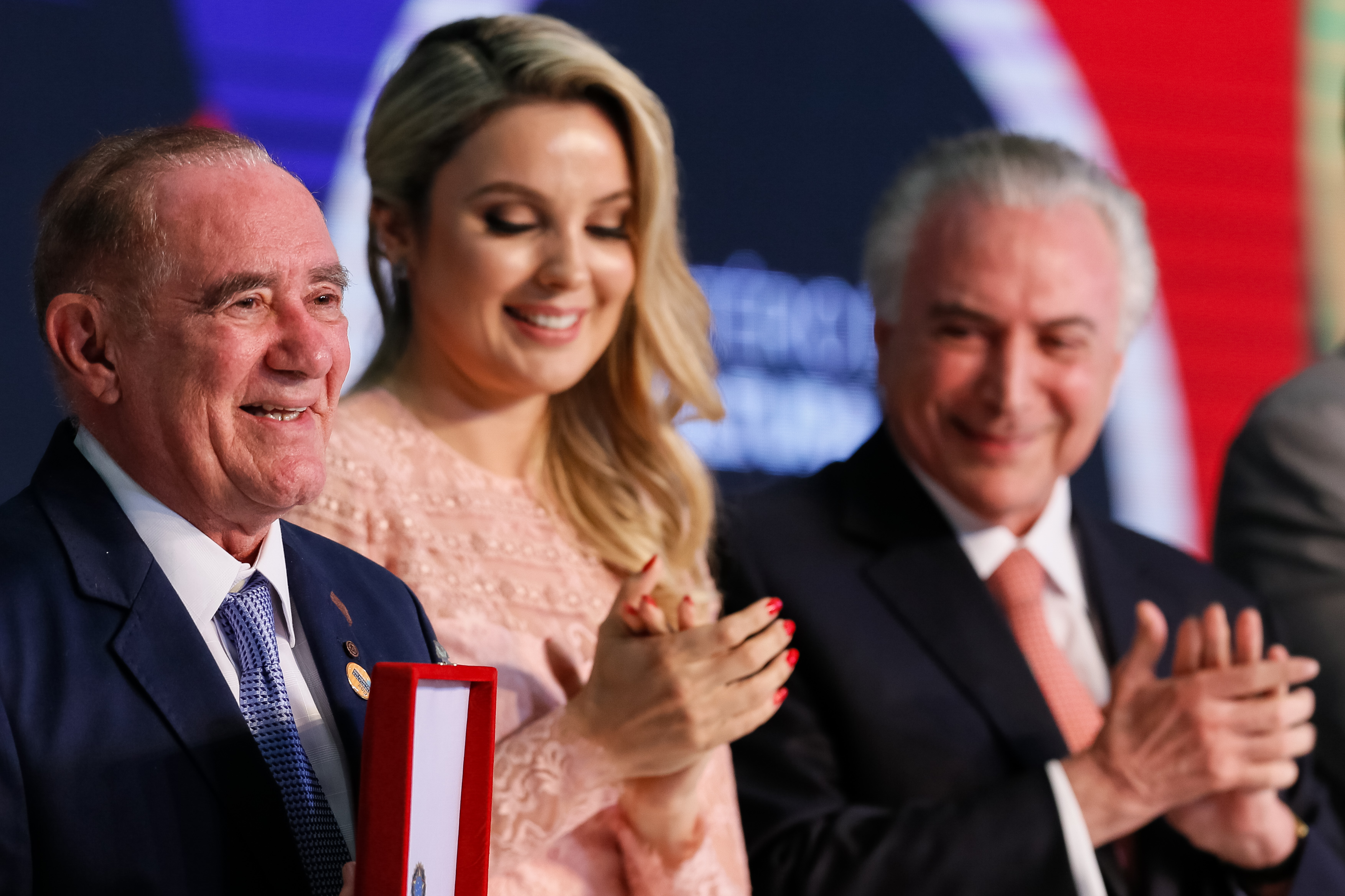 (Brasília - DF, 19/12/2017) Renato Aragão, recebe a Insígnia da Ordem do Mérito Cultural no Grau de Grâ-Cruz . Foto: Beto Barata/PR